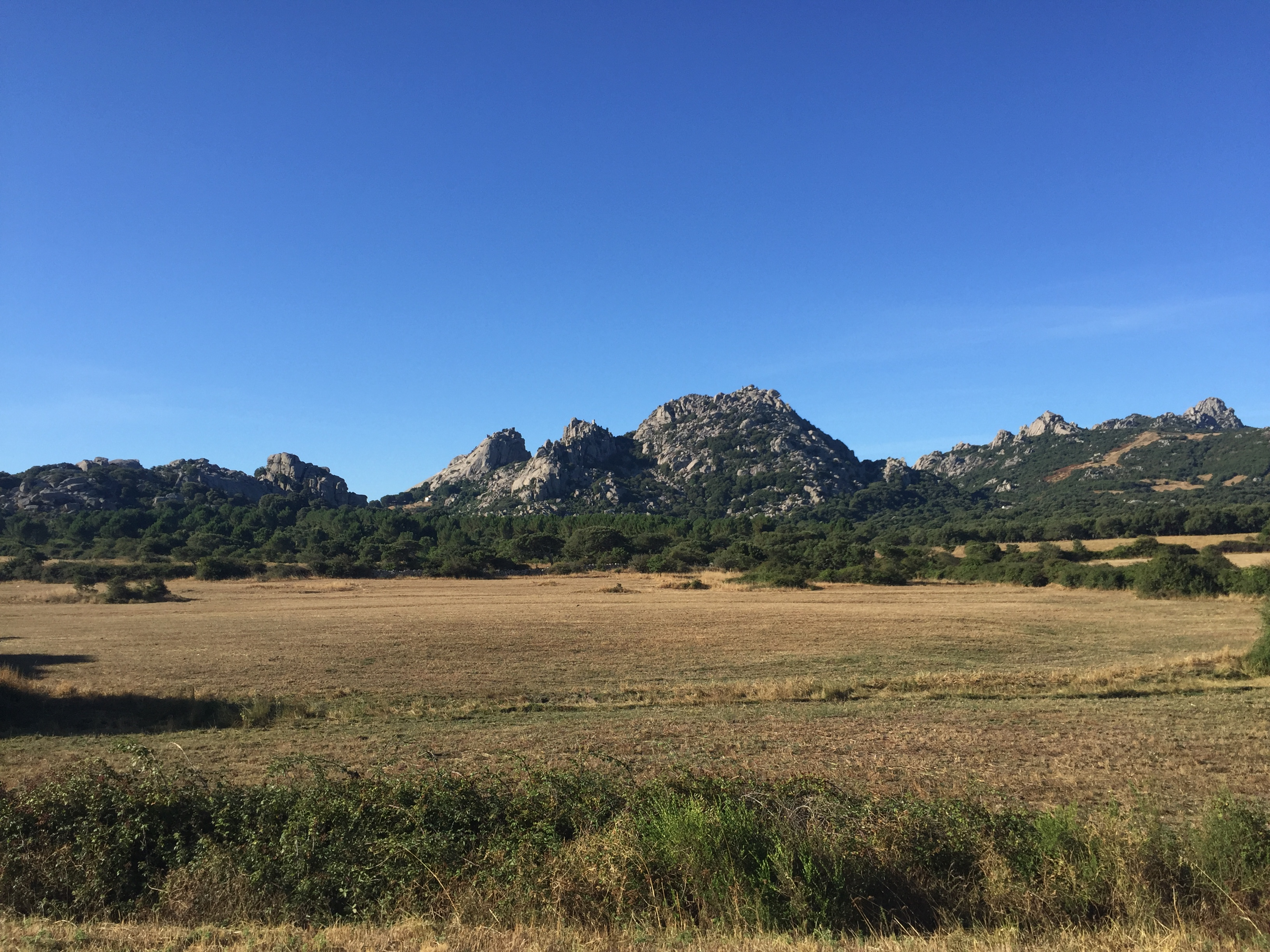 Image d'Aggius, 2016